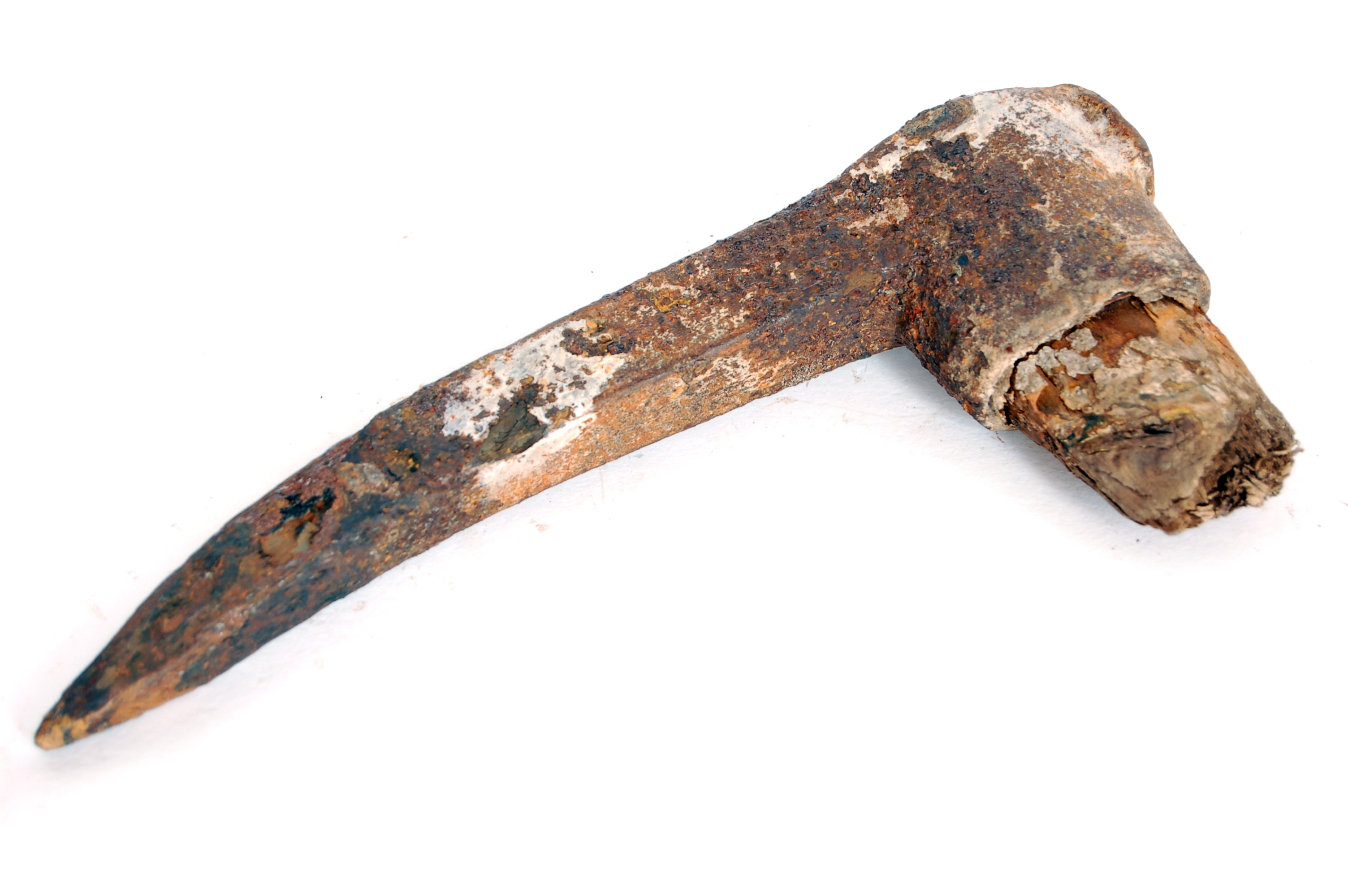 Kilof górniczy z ułamanym styliskiem - poł. XX w. Sztolnia "Emmanuel", Złoty Stok.